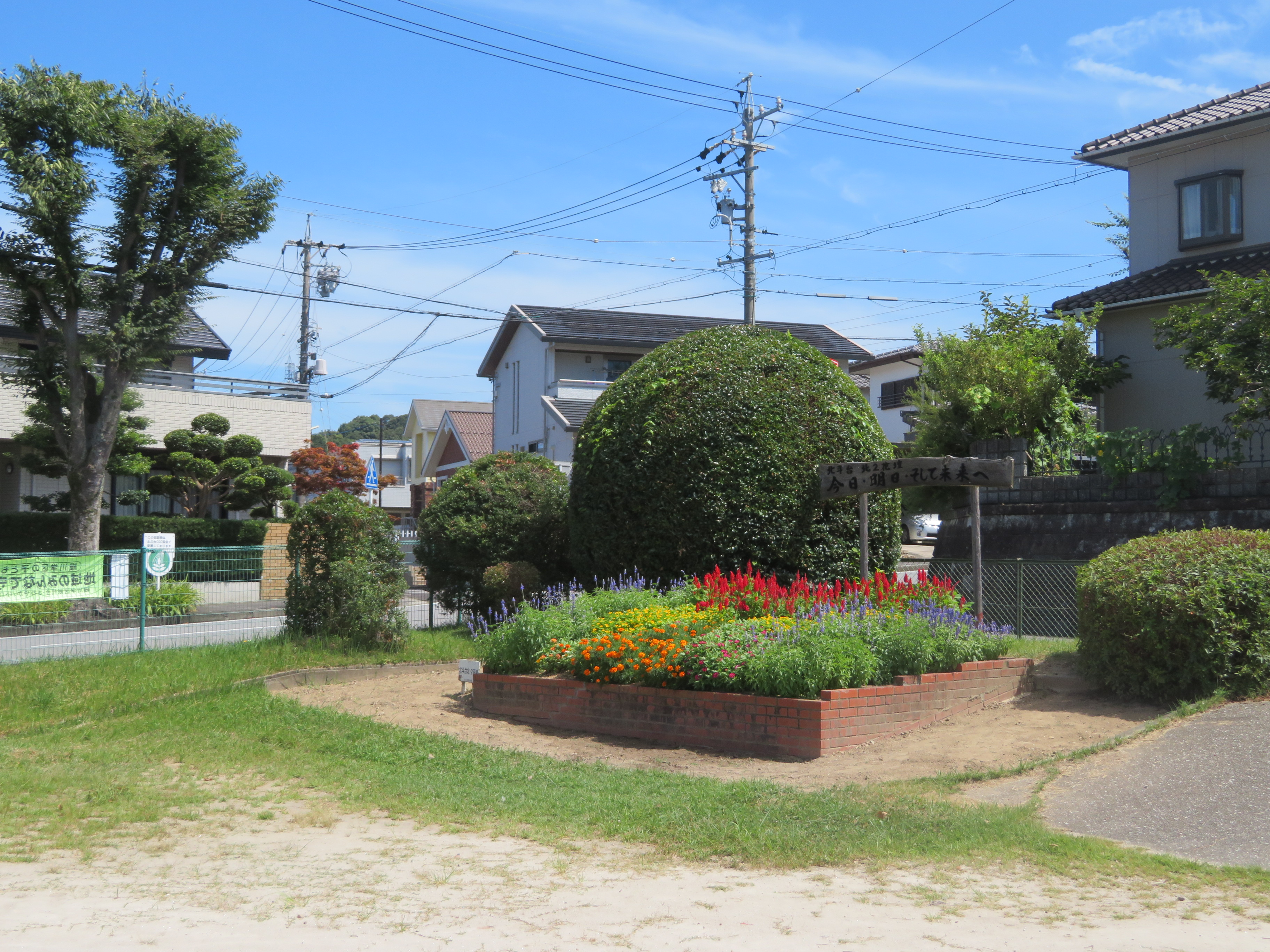 北斗台1号公園（岡崎市細川町）